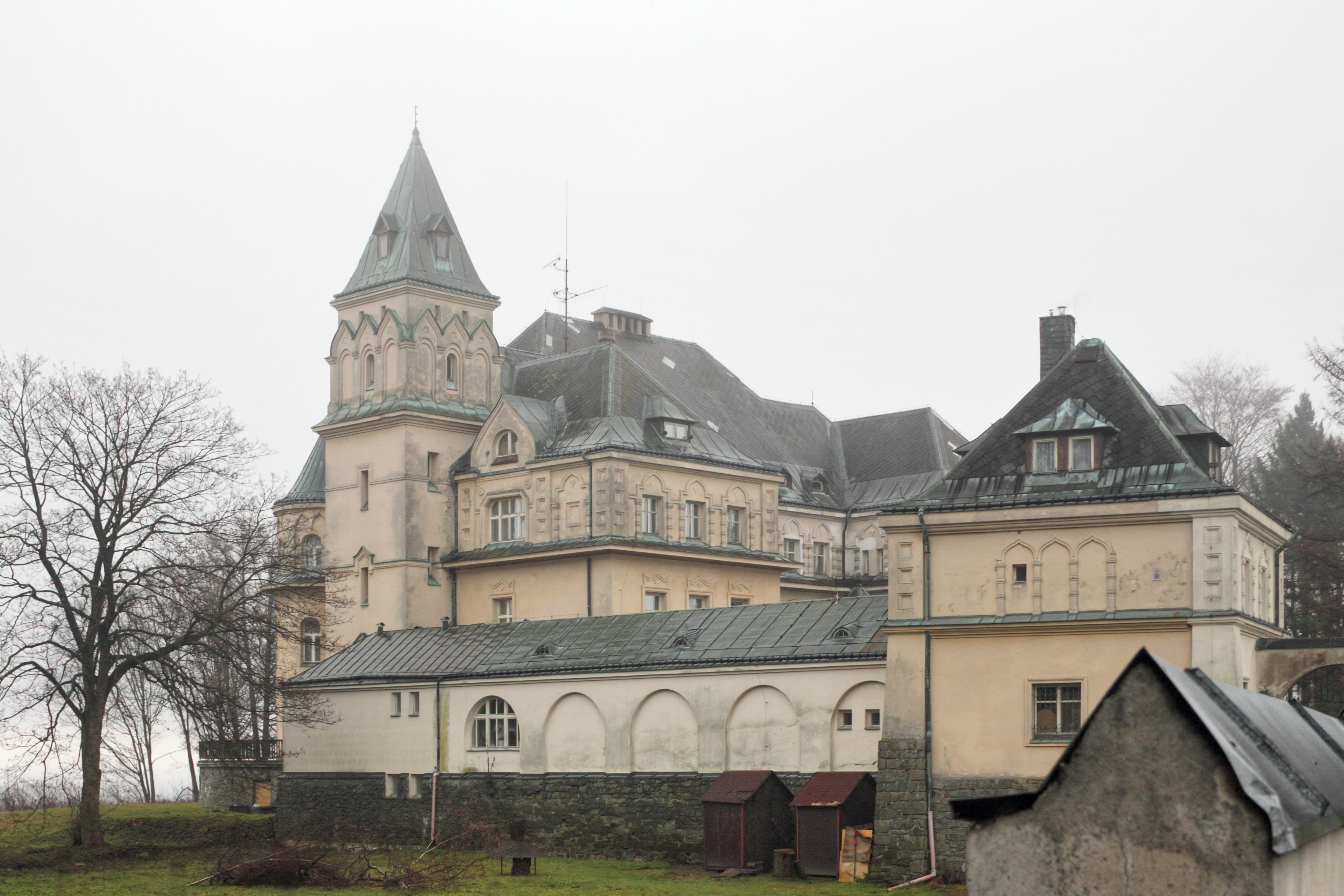 Zámeček "Větrov" (Kramářova vila postavena podle plánů Vladimira Alexandroviče Brandta a Ivana Vasilijeviče Feofilova v letech 1927 - 1931), Lyžařská 307, Vysoké nad Jizerou